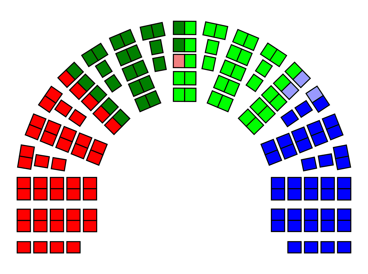 Mandatfordelingen etter Stortingsvalget 1930 illustrert med seter Arbeiderpartiet Bondepartiet Radikale Folkeparti Venstre Frisinnede Folkeparti Høyre